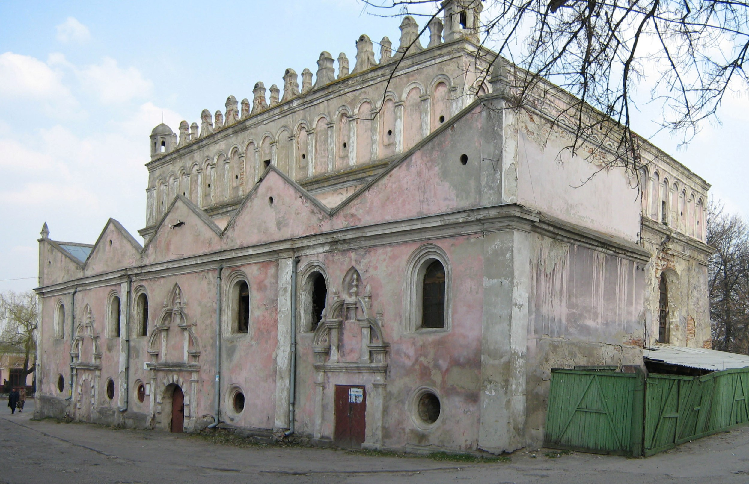 Синагога (мур.), Жовква, вул.Запорізька